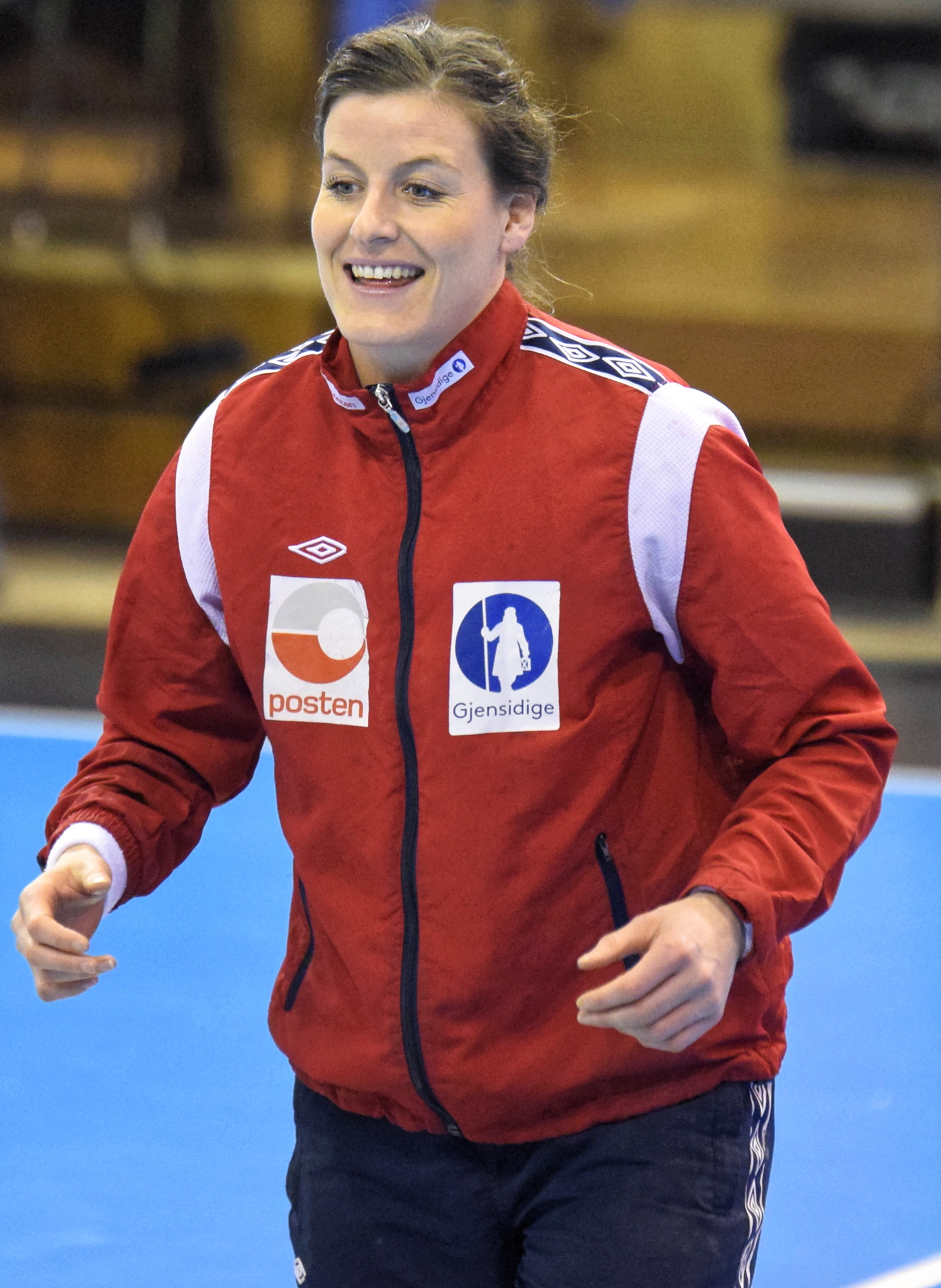 Rencontre entre la Pologne et la Norvège lors de la Golden League de handball. A Dijon, le 19 mars 2015.